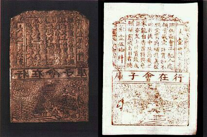 Медная пластина для печатания бумажных денег, изготовленная между 1127 и 1279 годами. Китай. Справа - современный пробный оттиск, сделанный с этой пластины.